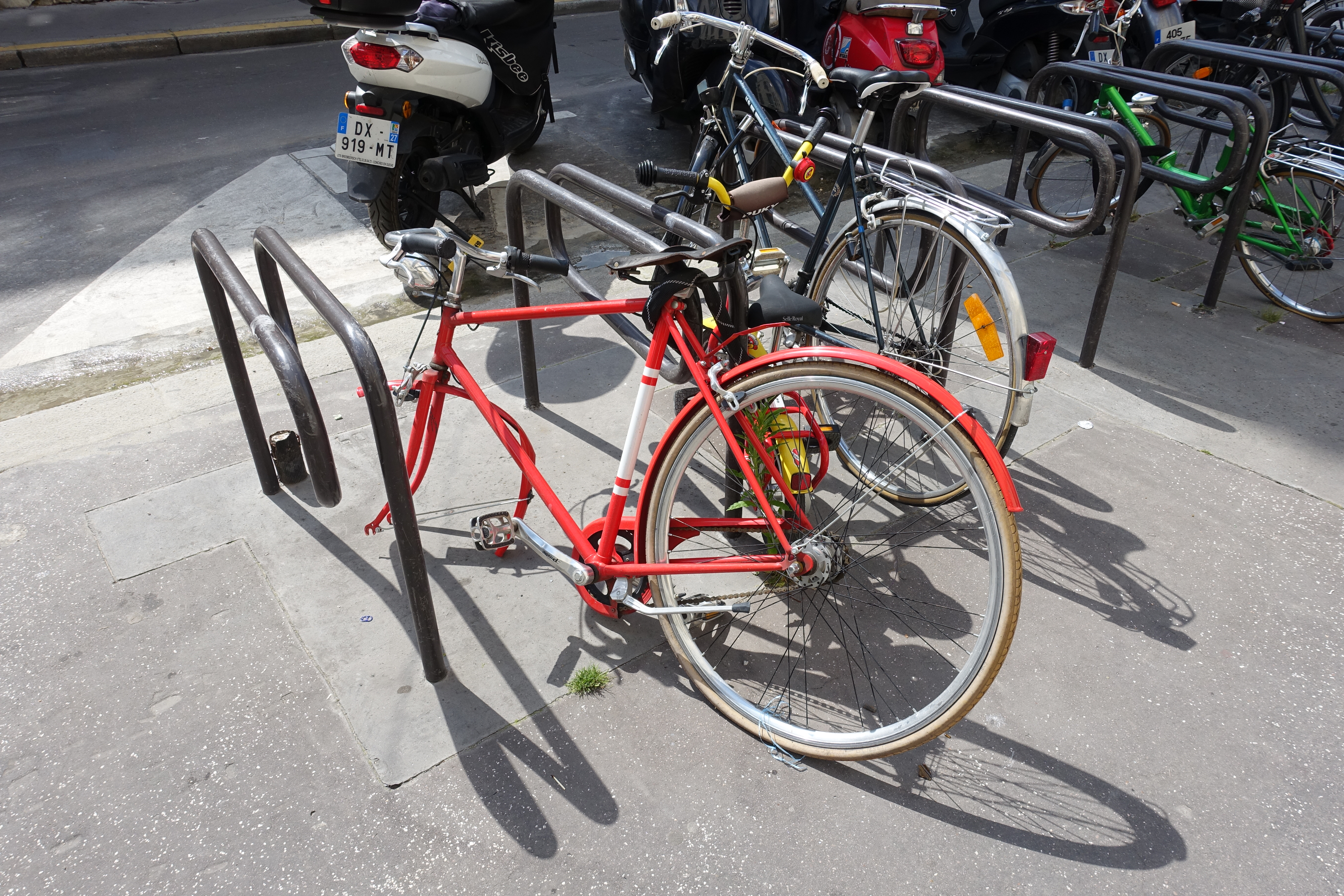 Stolen wheel @ Paris